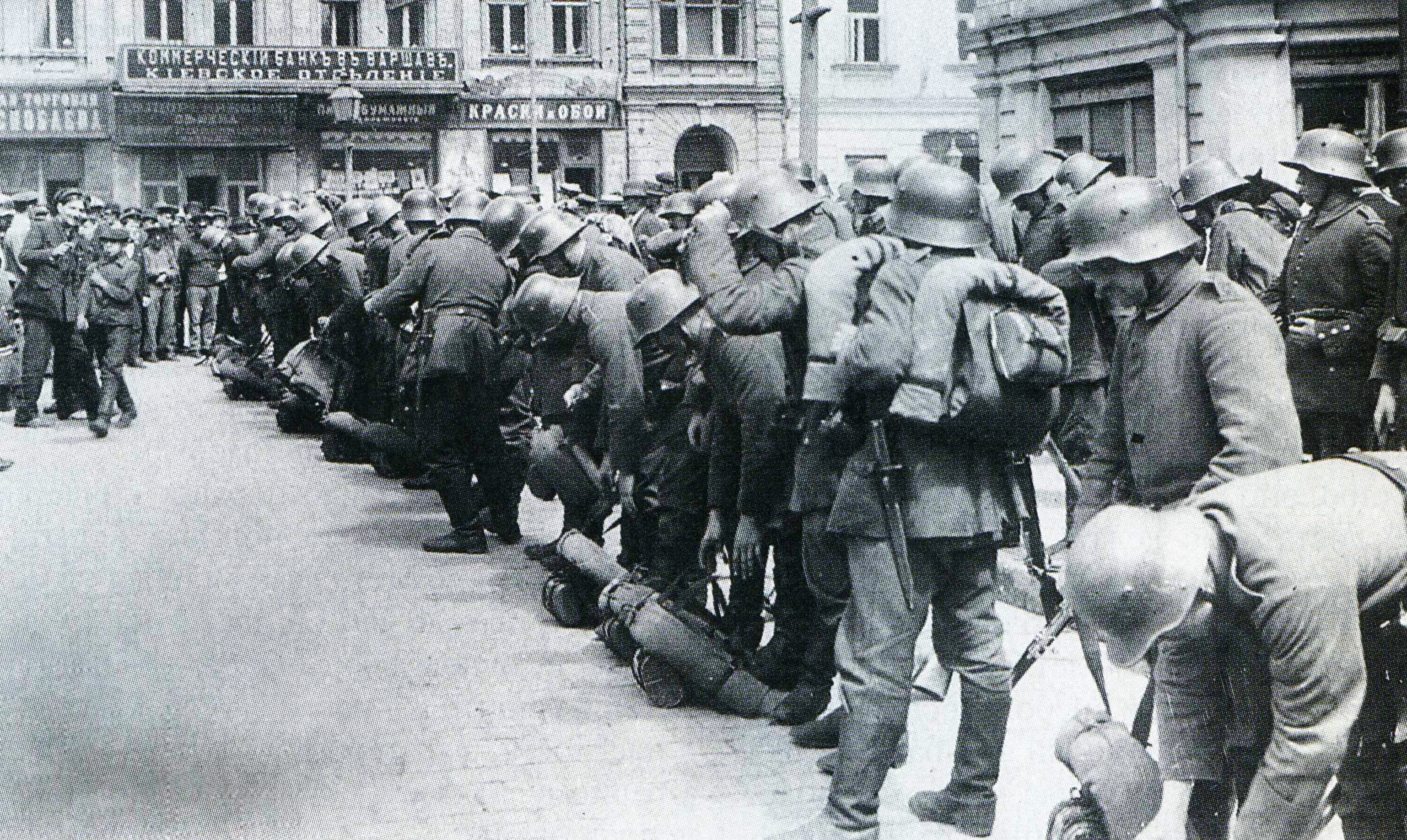 Последствия Брестского мира: германские войска под командованием генерала фон Эйхгорна заняли Киев. Видна вывеска киевского отделения Коммерческого банка в Варшаве. Март 1918 года.